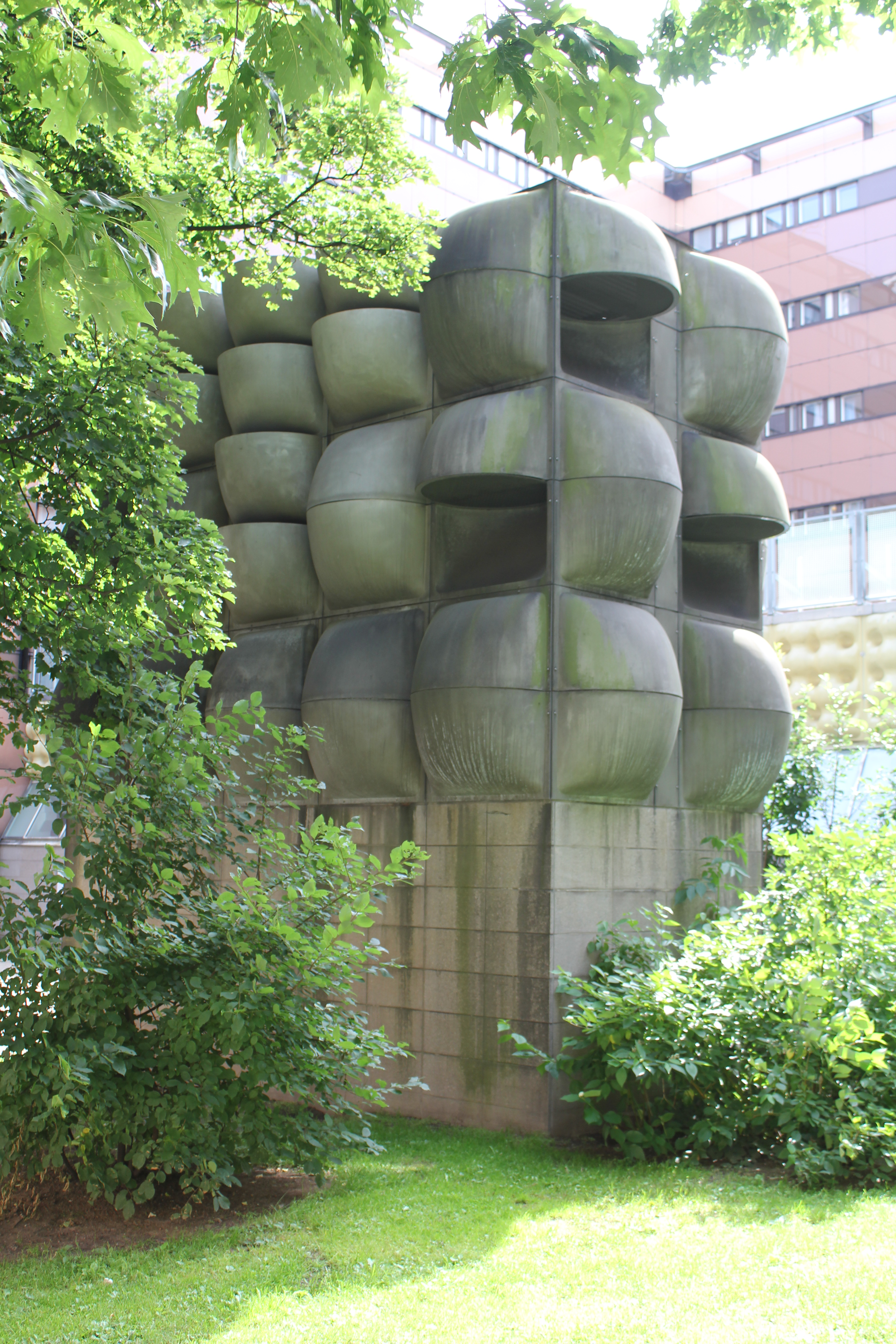 Ventilationstrummor designade av Lars Englund. Rikspolisstyrelsens hus, Polhemsgatan 30, Kungsholmen.